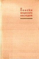 Обложка книги Пересветов Р.Т. Поиски бесценного наследия (о судьбе некоторых рукописей В.И.Ленина). – М.: Госполитиздат, 1963. – 320 с.